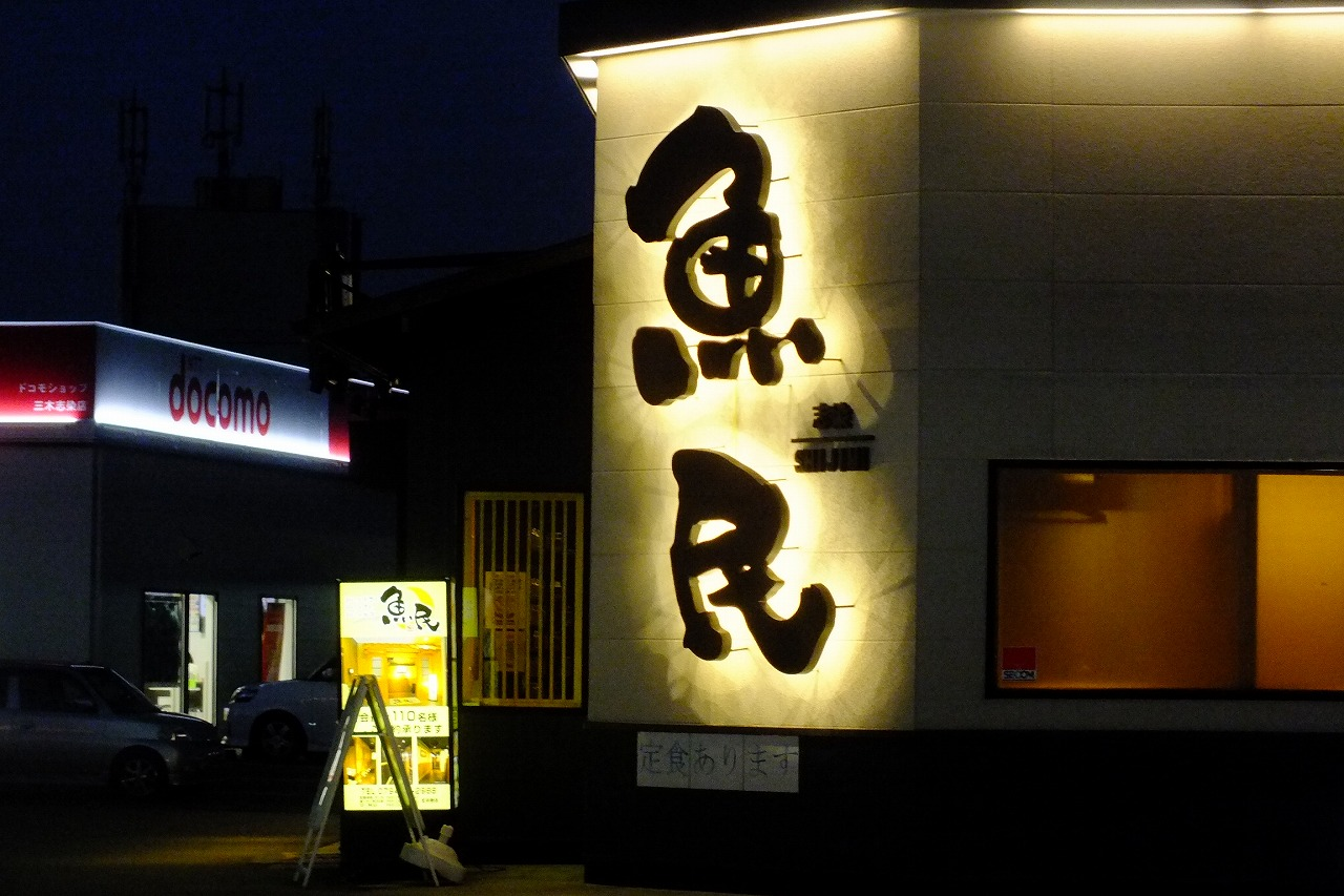 〒673-0541 兵庫県三木市志染町広野５丁目１ 電話:0794-87-2988